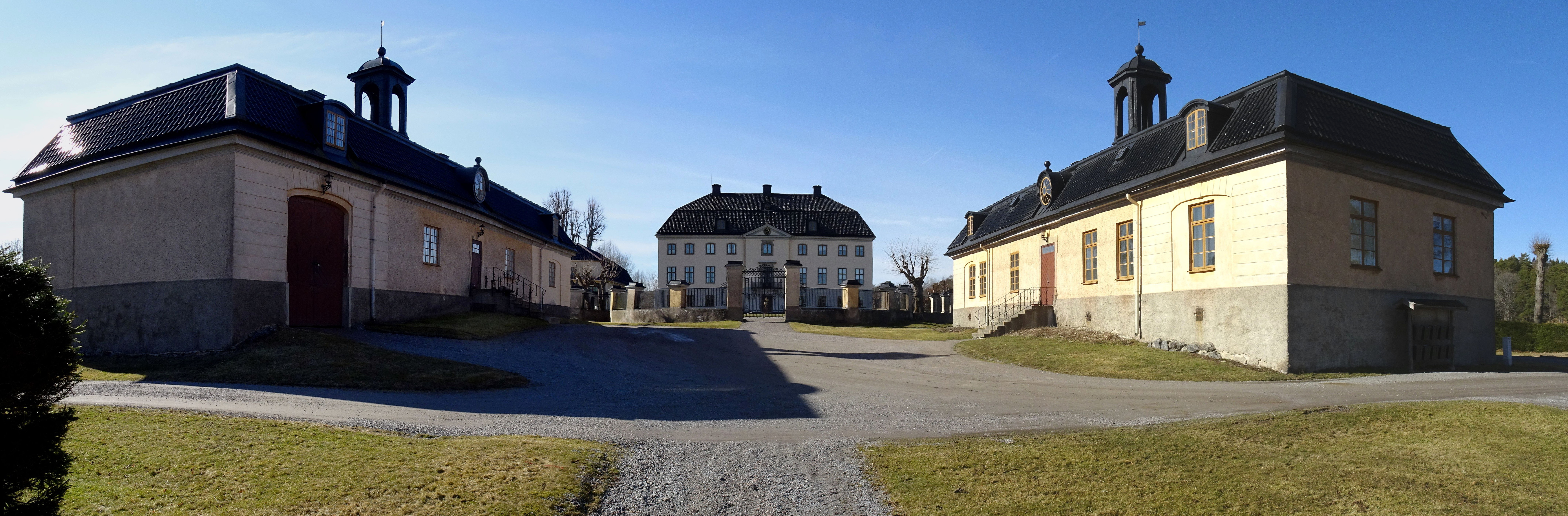 Erstaviks huvudbyggnad och flyglar